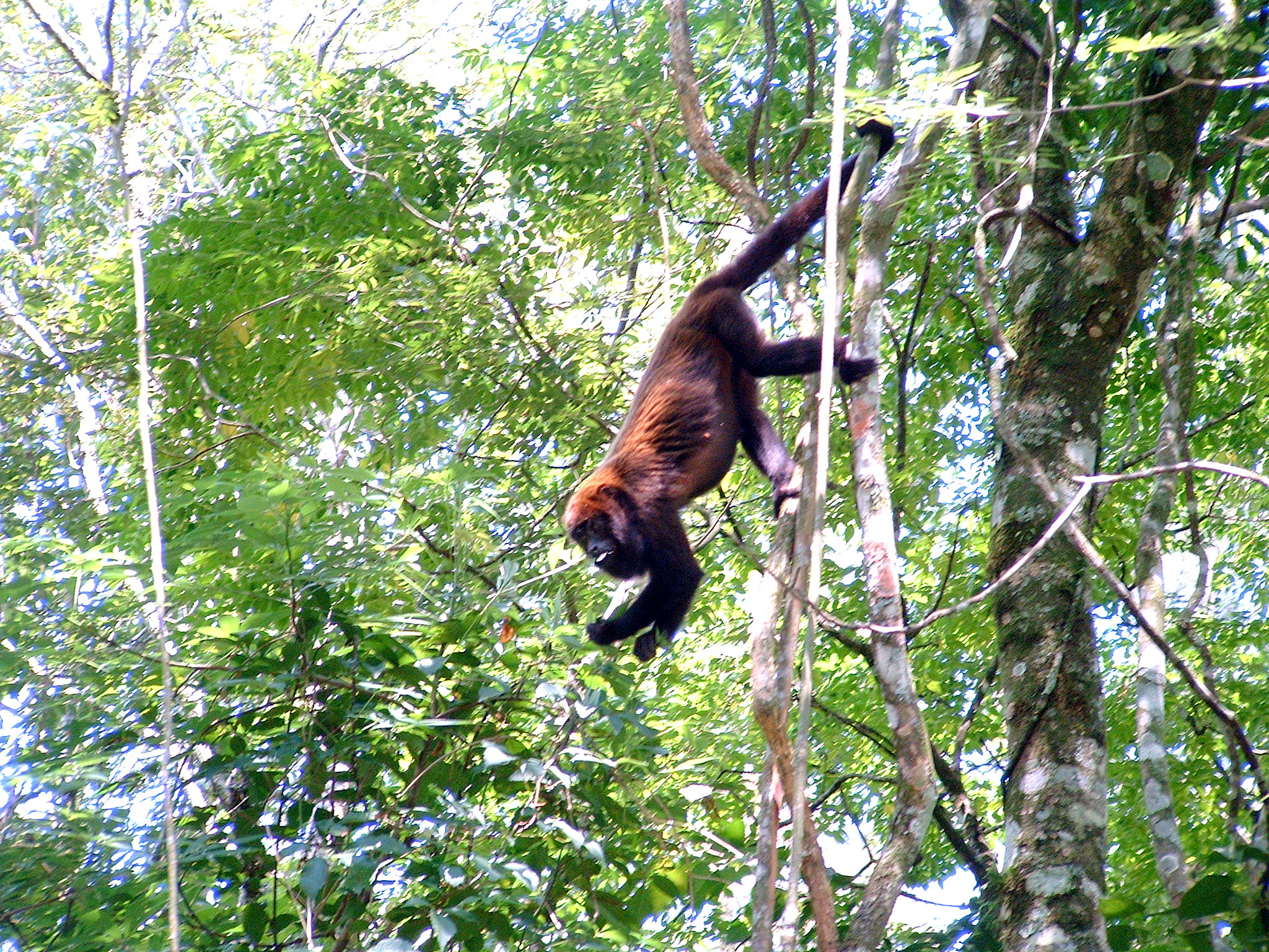 Bugio-ruivo colhendo frutas